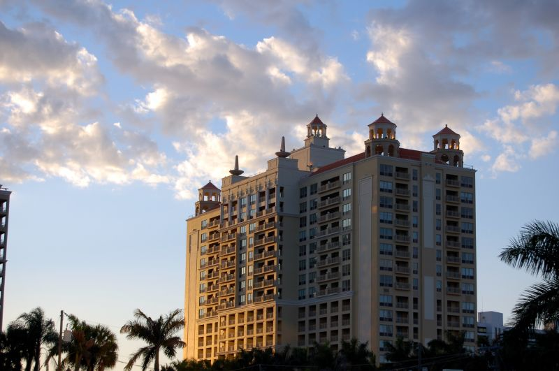 Sarasota Ritz